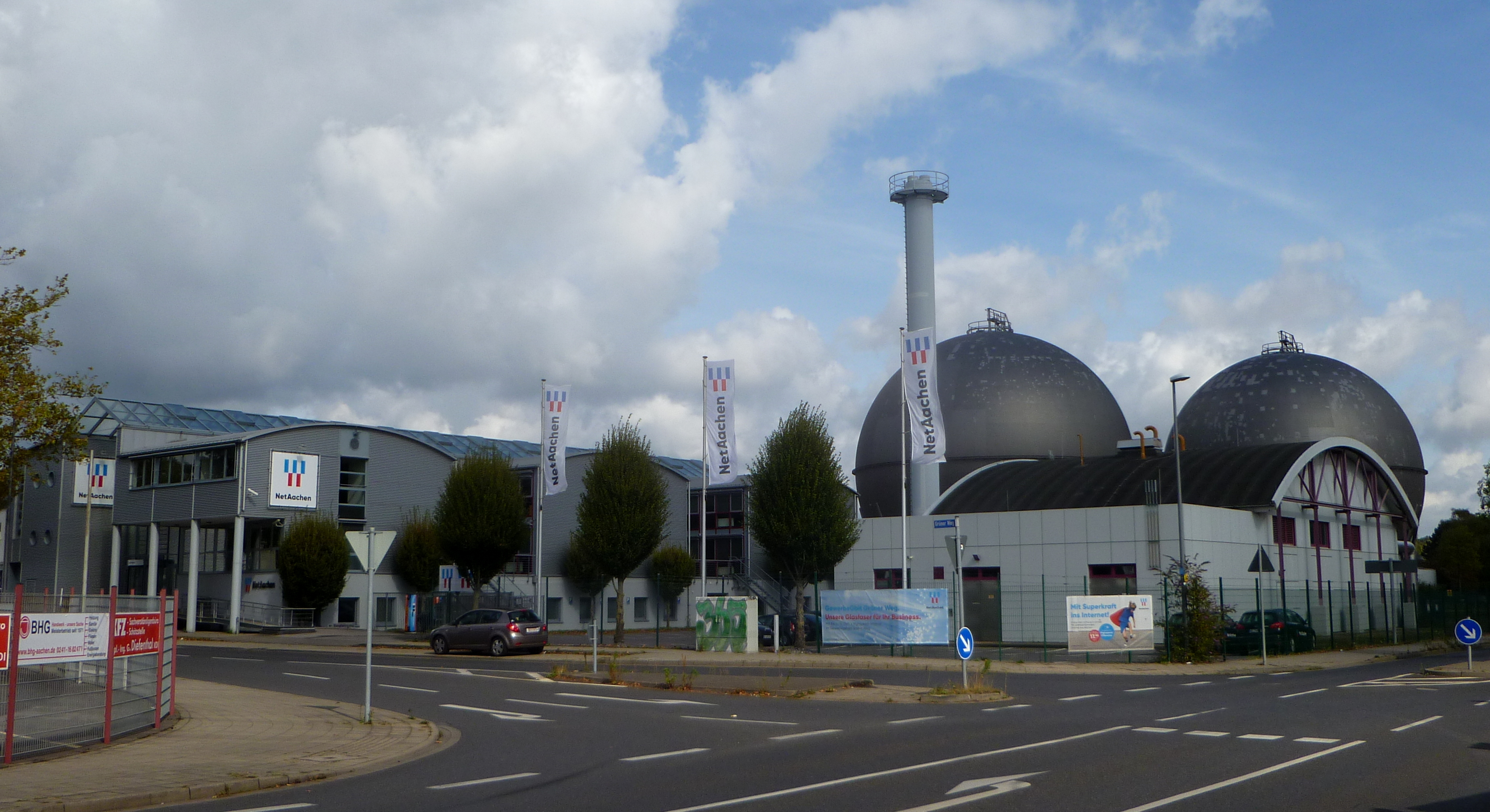 Kugelgasbehälter Aachen